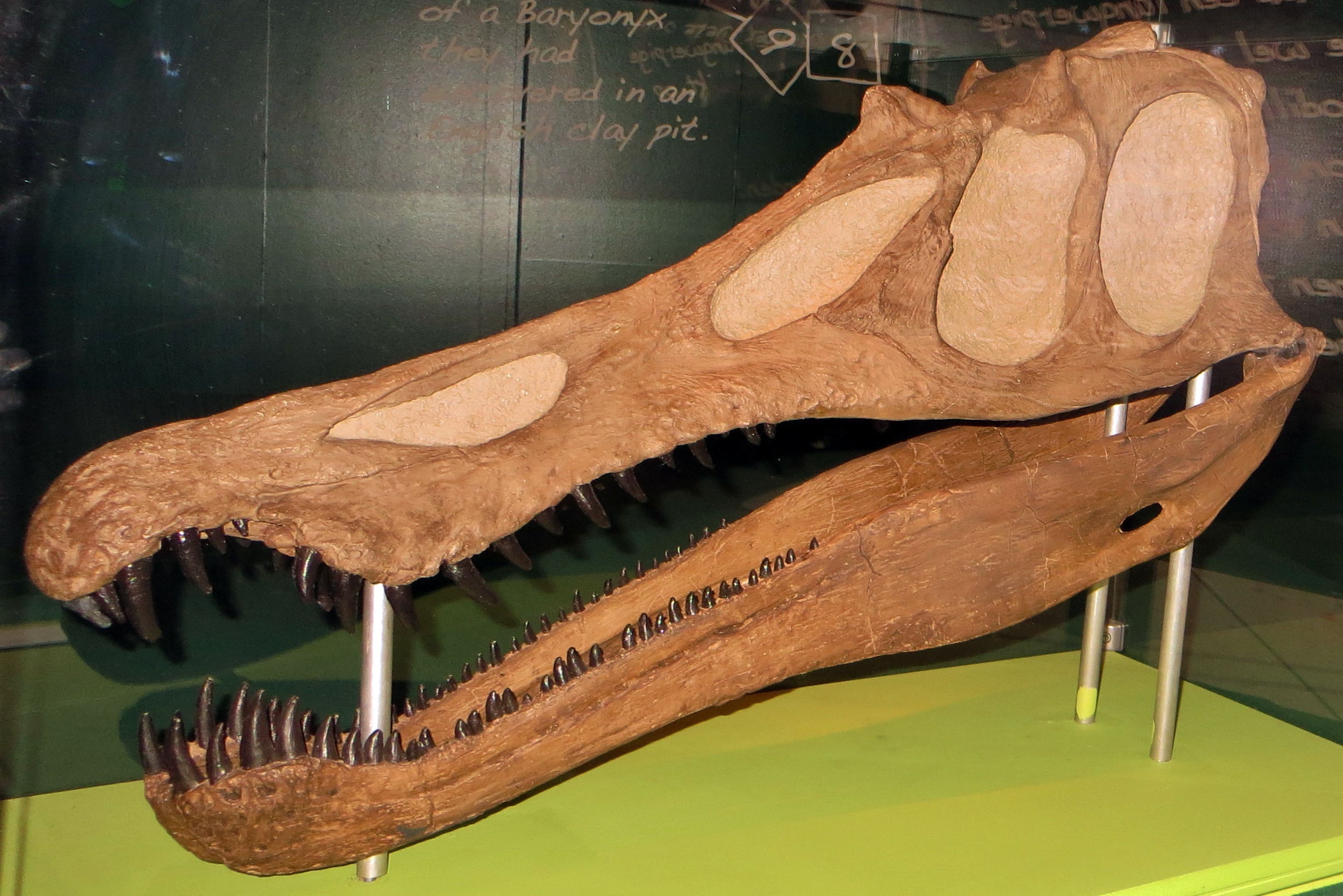 Fossil of Baryonyx - Took the picture at Museon, Den Haag